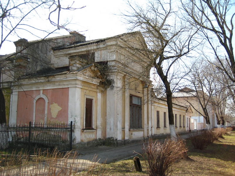 Бывшее здание Аудитории